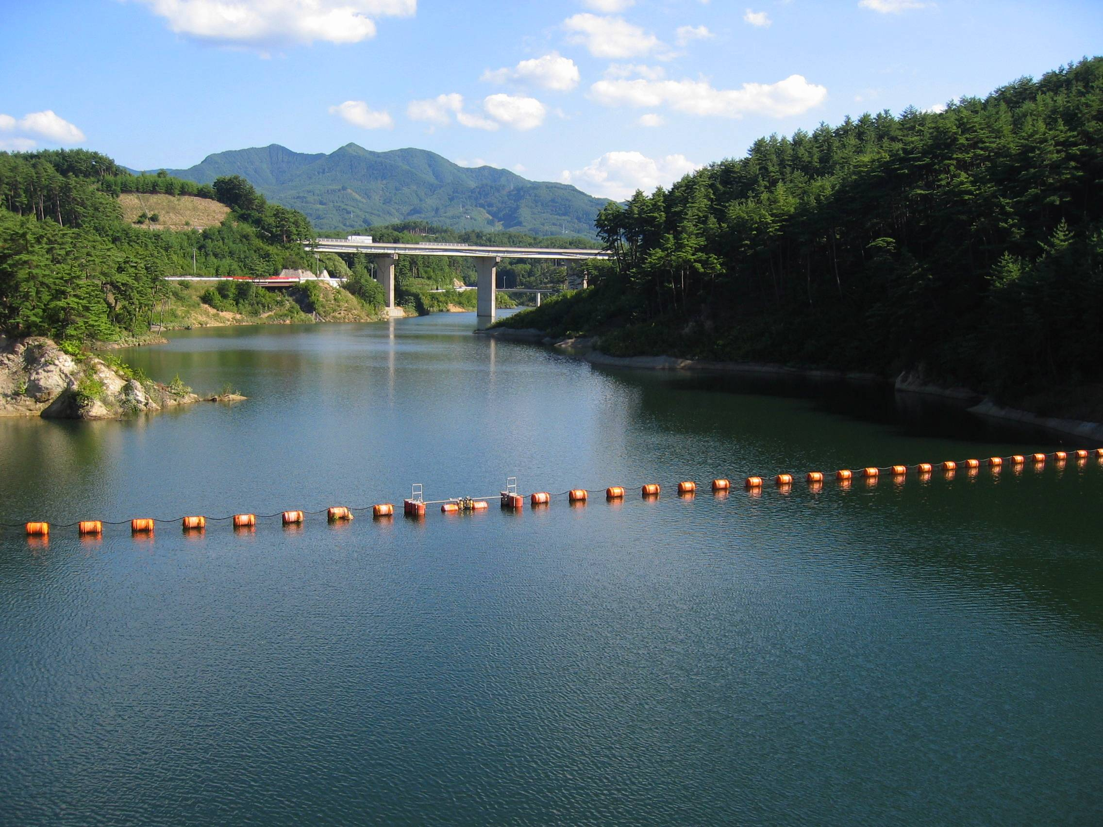 Onikuma Dam (小仁熊ダム) makes a lake.